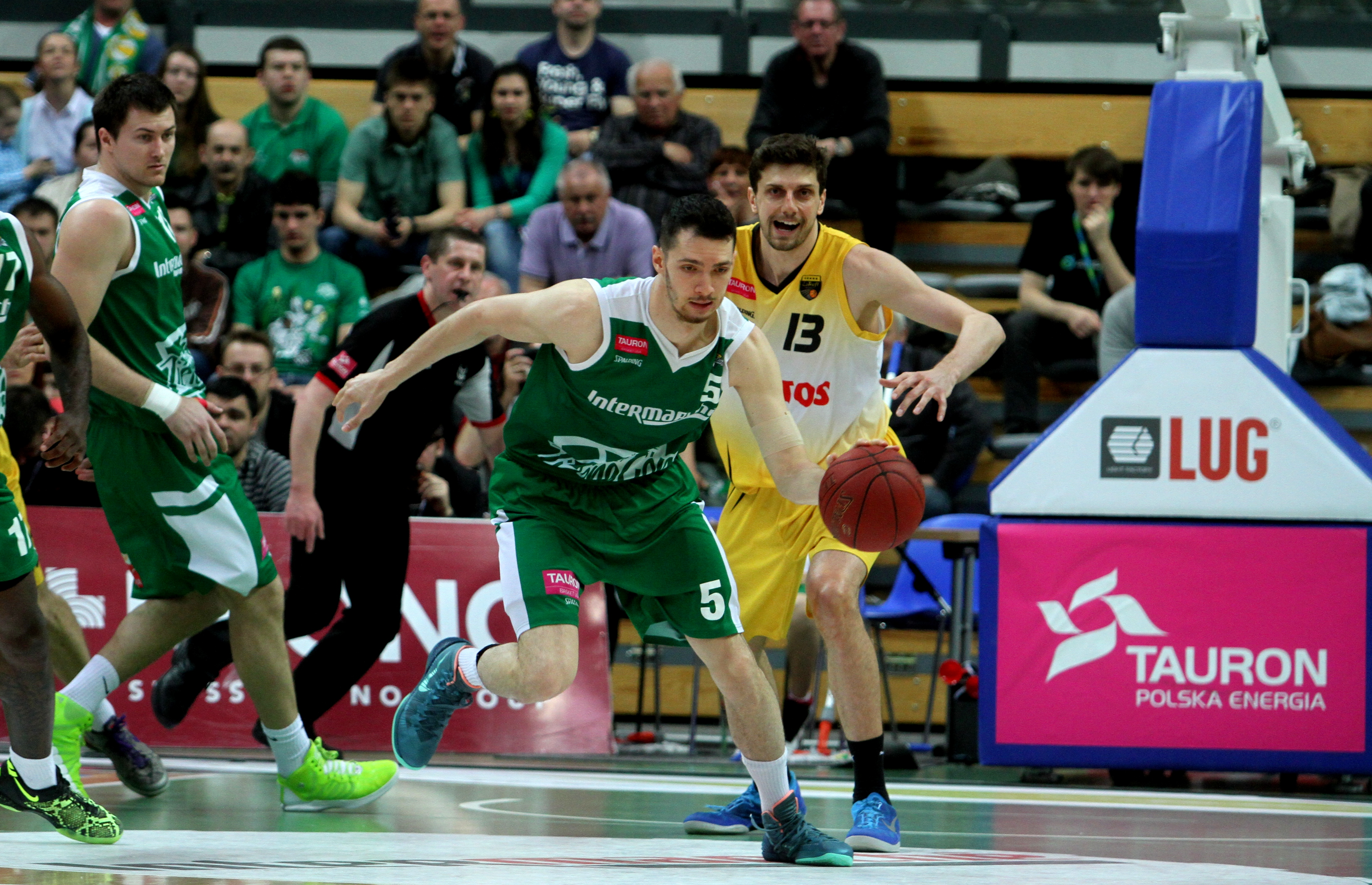 Aaron Cel Stelmet Zielona Góra